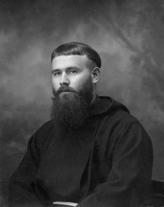 Fray Buenaventura de Arroyo Cerezo, capuchino de la Orden de Frailes Menores (OFMCcap), fotografía procedente del archivo de la Orden.